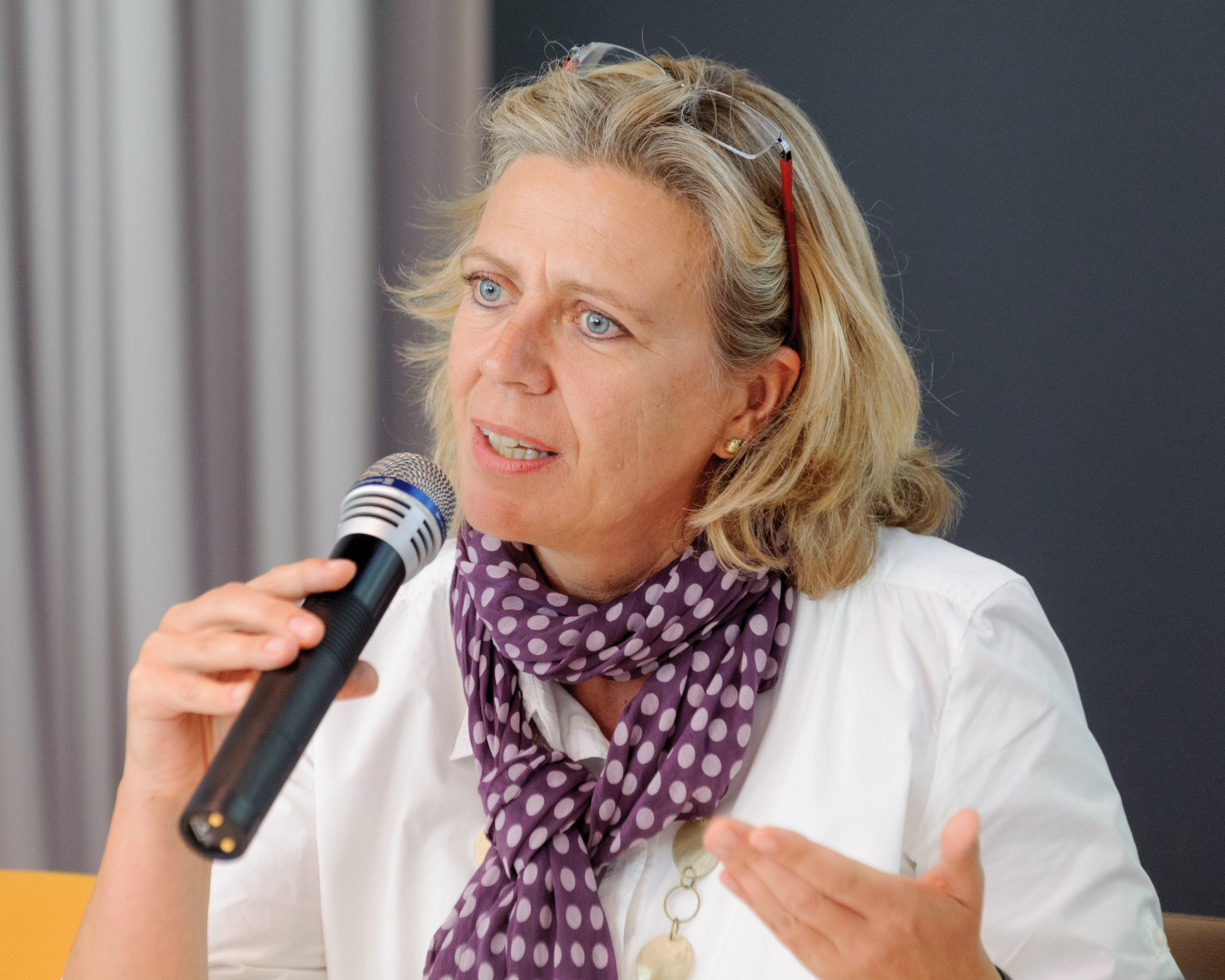 Dr. Sibyll Klotz (Stadträtin für Gesundheit, Soziales und Stadtentwicklung in Berlin Tempelhof-Schöneberg) Tagung: Hochinklusiv! Zusammenhalt einer vielfältigen Gesellschaft Foto: Stephan Röhl (